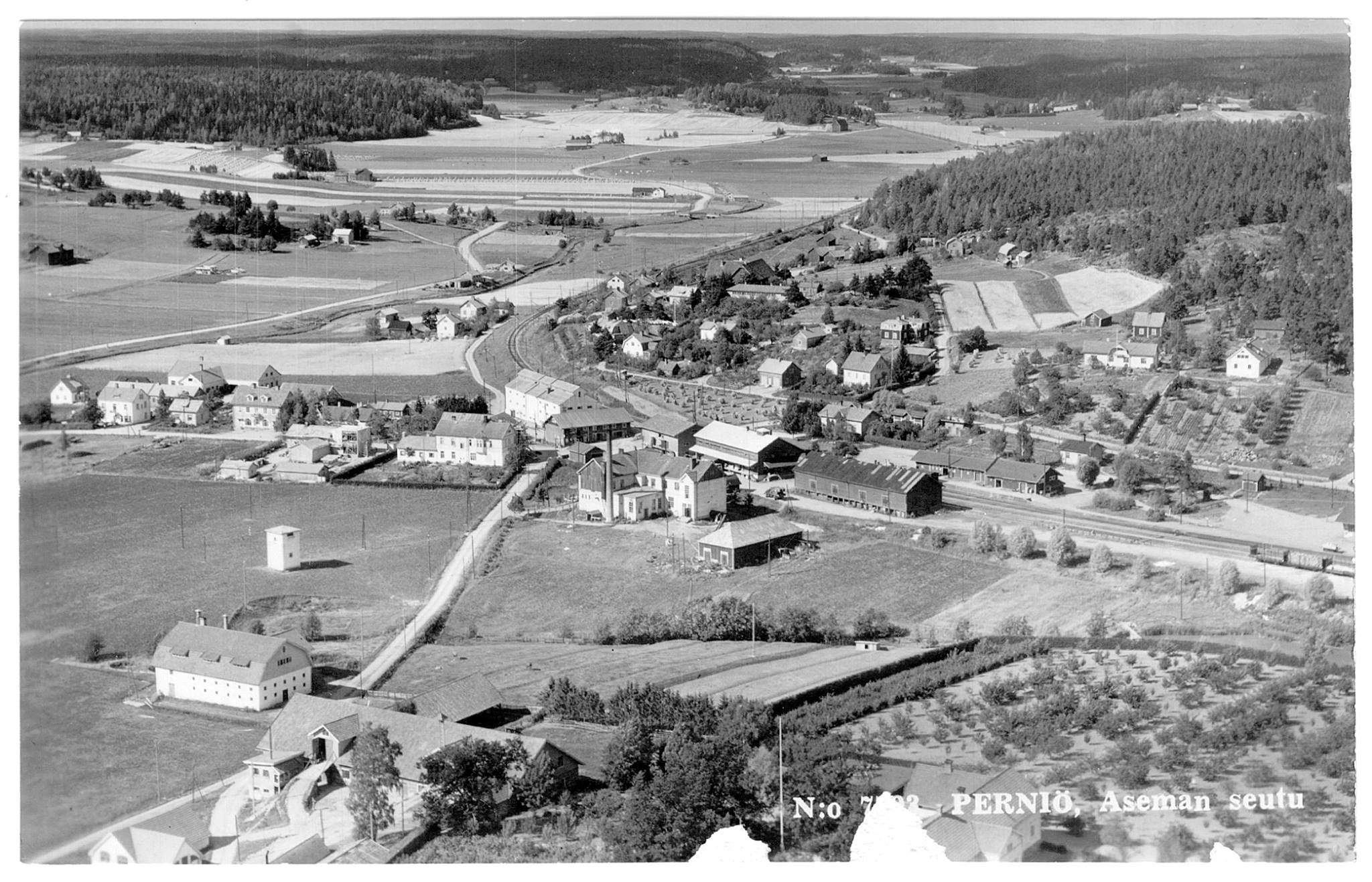 perniön aseman seutua